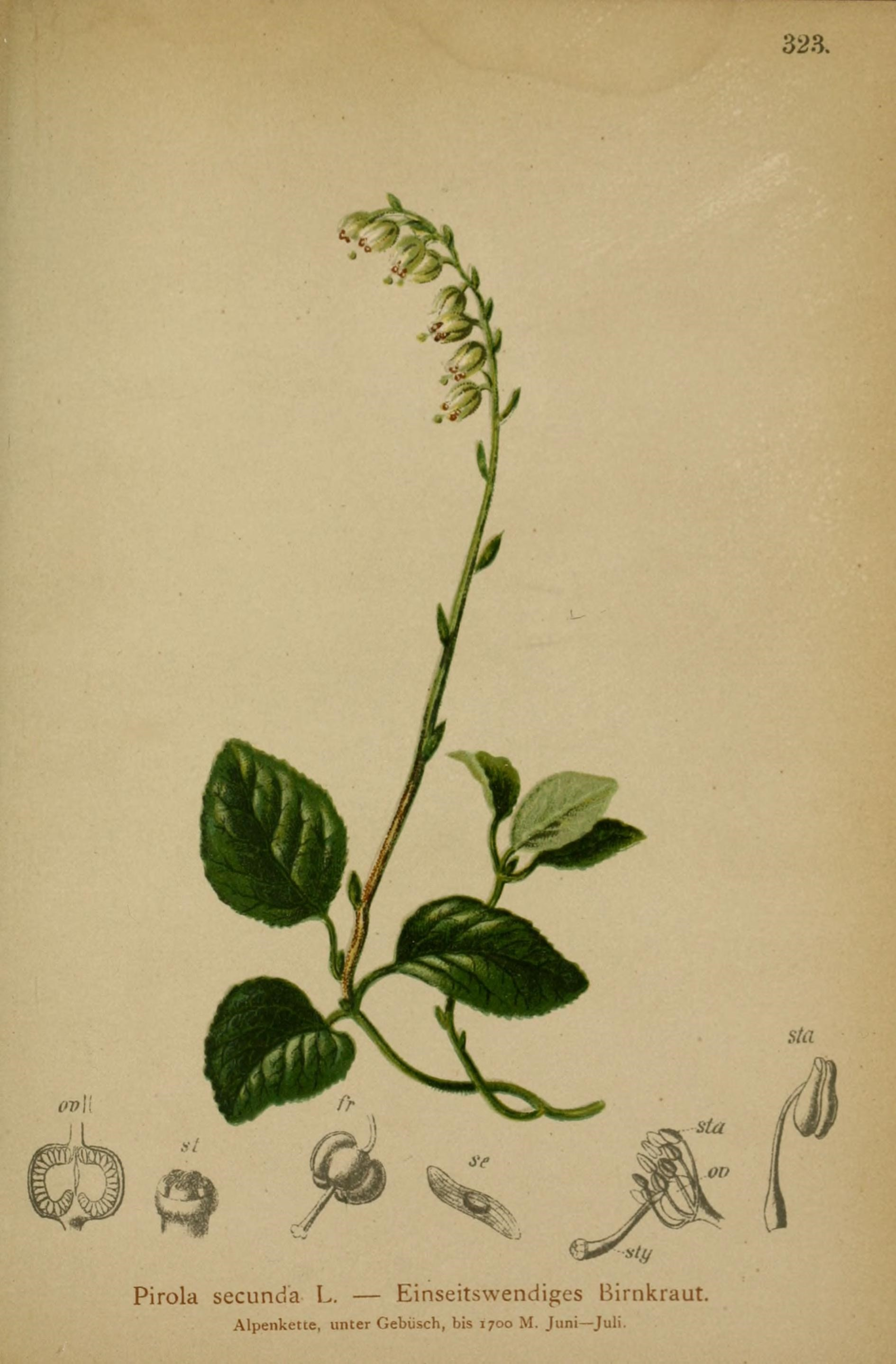 323. Pirola secunda L. — Einseitswendiges Birnkraut. Alpenketie, unter Gebüsch, bis 1700 M. Juni— Juli.